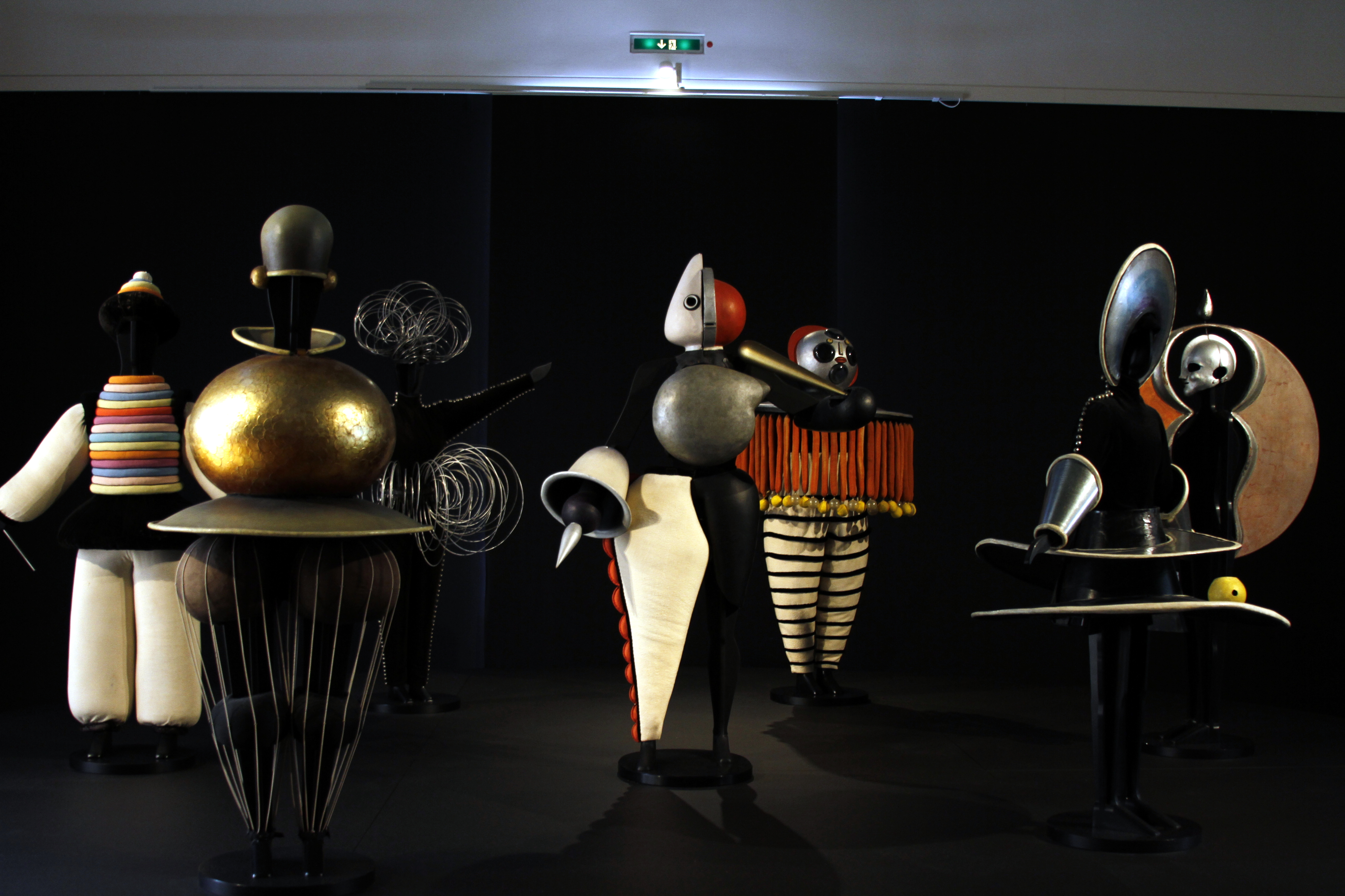 Staatsgalerie - Stuttgart - Germany